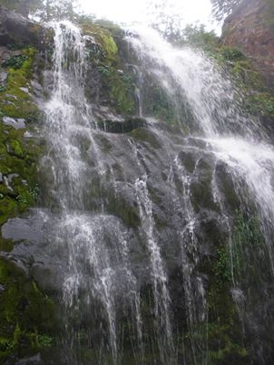 Lago ubicado a 50 km de la localidad de Alto Rio Senguer